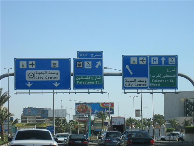 Madina Road, Jeddah, Saudi Arabia